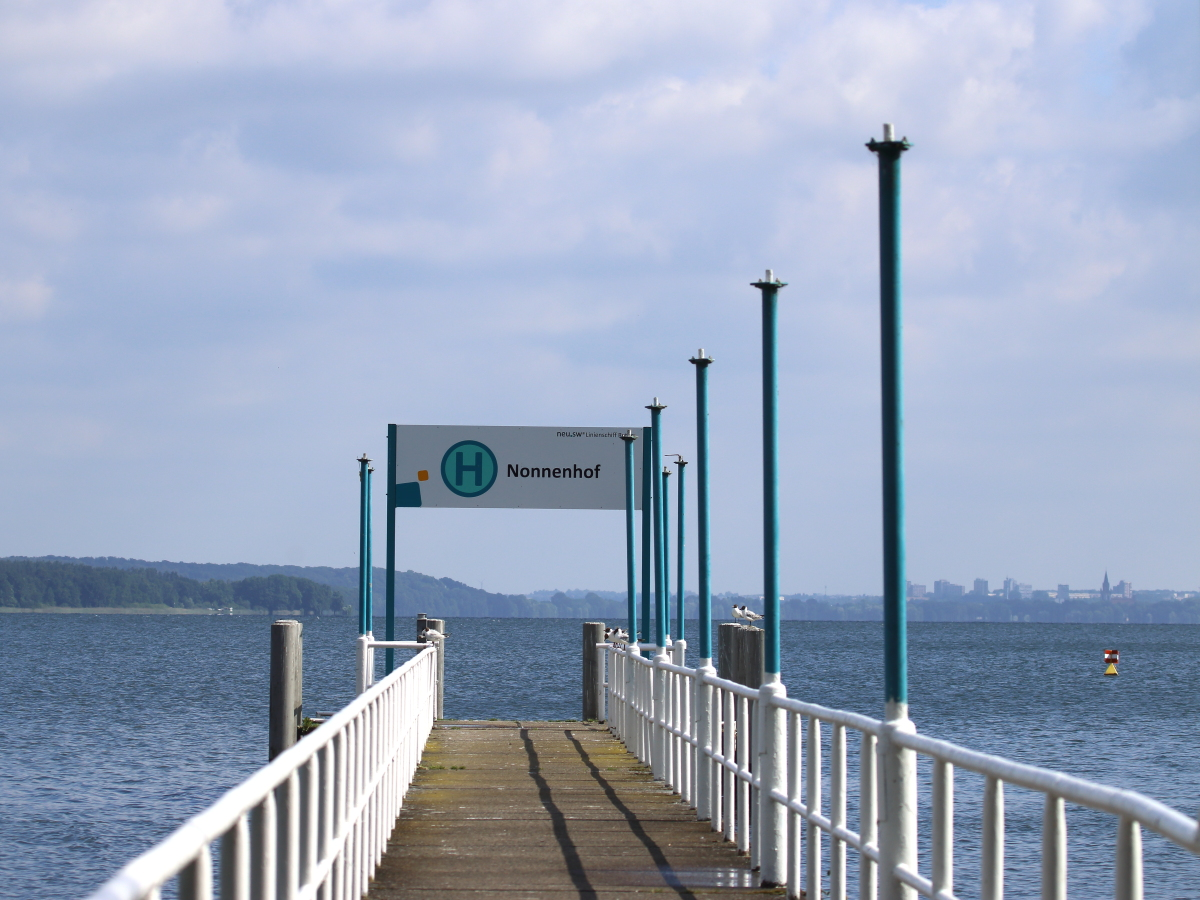 Bootsanleger Nonnenhof im Tollensesee